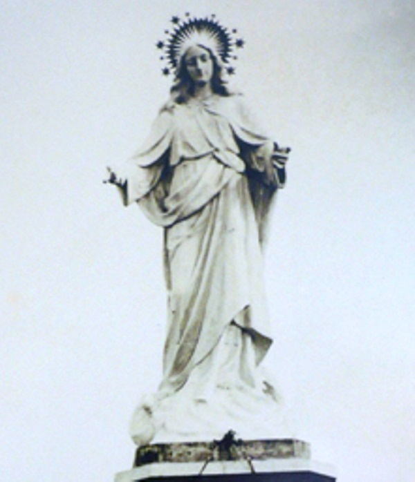 Nuestra Señora de las Misericordias. Santa Rosa de Osos, Antioquia. Colombia.